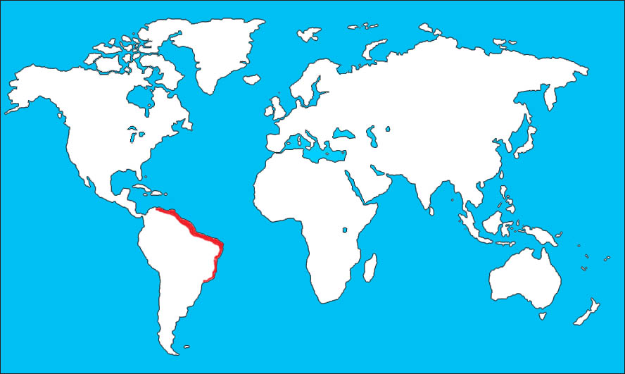 Eudocimus ruber elterjedési területe